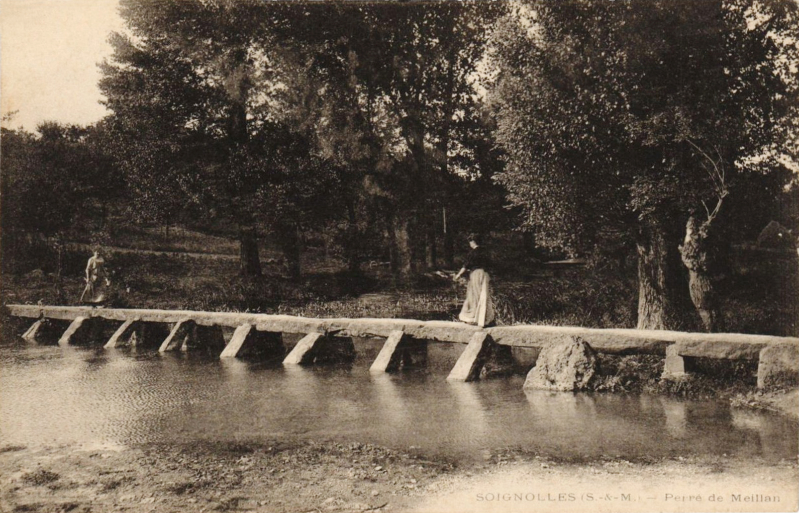 Passage bâti à l'aide de grands blocs parallélépipédiques dans l'Yerres et servant de gué ; la vue est prise depuis l'aval. Les renforts obliques n'existent que du côté opposé au courant. Le nom local du dispositif est "perré", parfois orthographié "perret" sur d'autres cartes postales.